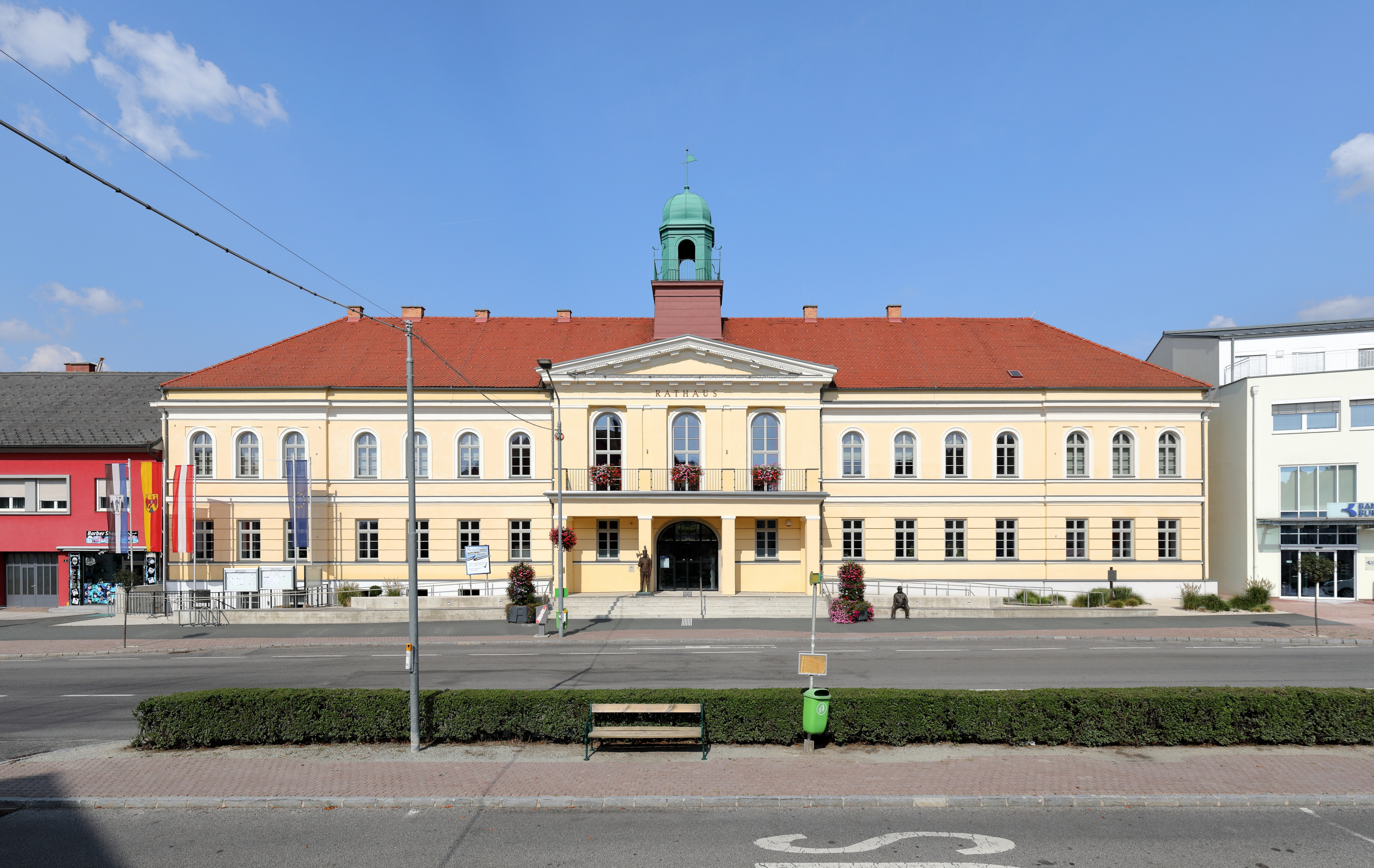 Rathaus der burgenländischen Bezirkshauptstadt Oberwart.Das Gebäude wurde 1905 errichtet. Nach Zerstörrung im Jahr 1945 wurde es bis 1949 neu errichtet, unter teilweiser Verwendung der alten Bausubstanz. Nach einem Umbau und Sanierung um rd. 4,5 Millionen Euro ab 2015 unter Federführung des Architekten Gerald Prenner fand am 14.9.2017 die feierliche Wiedereröffnung statt.